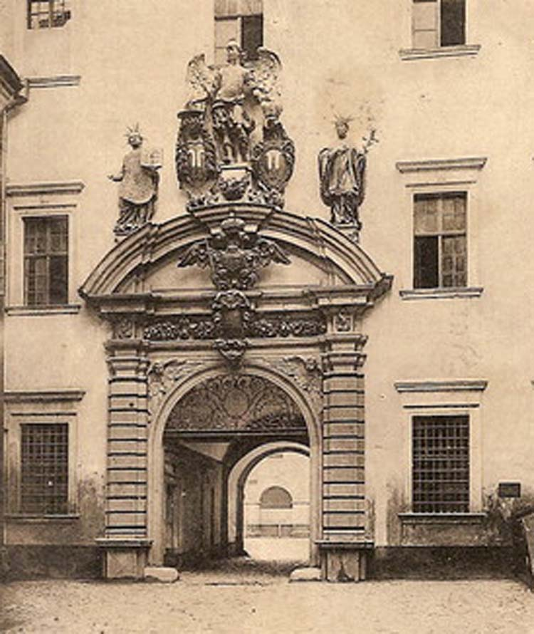 Einganstor zur Jesuitenkaserne in Brünn in Mähren